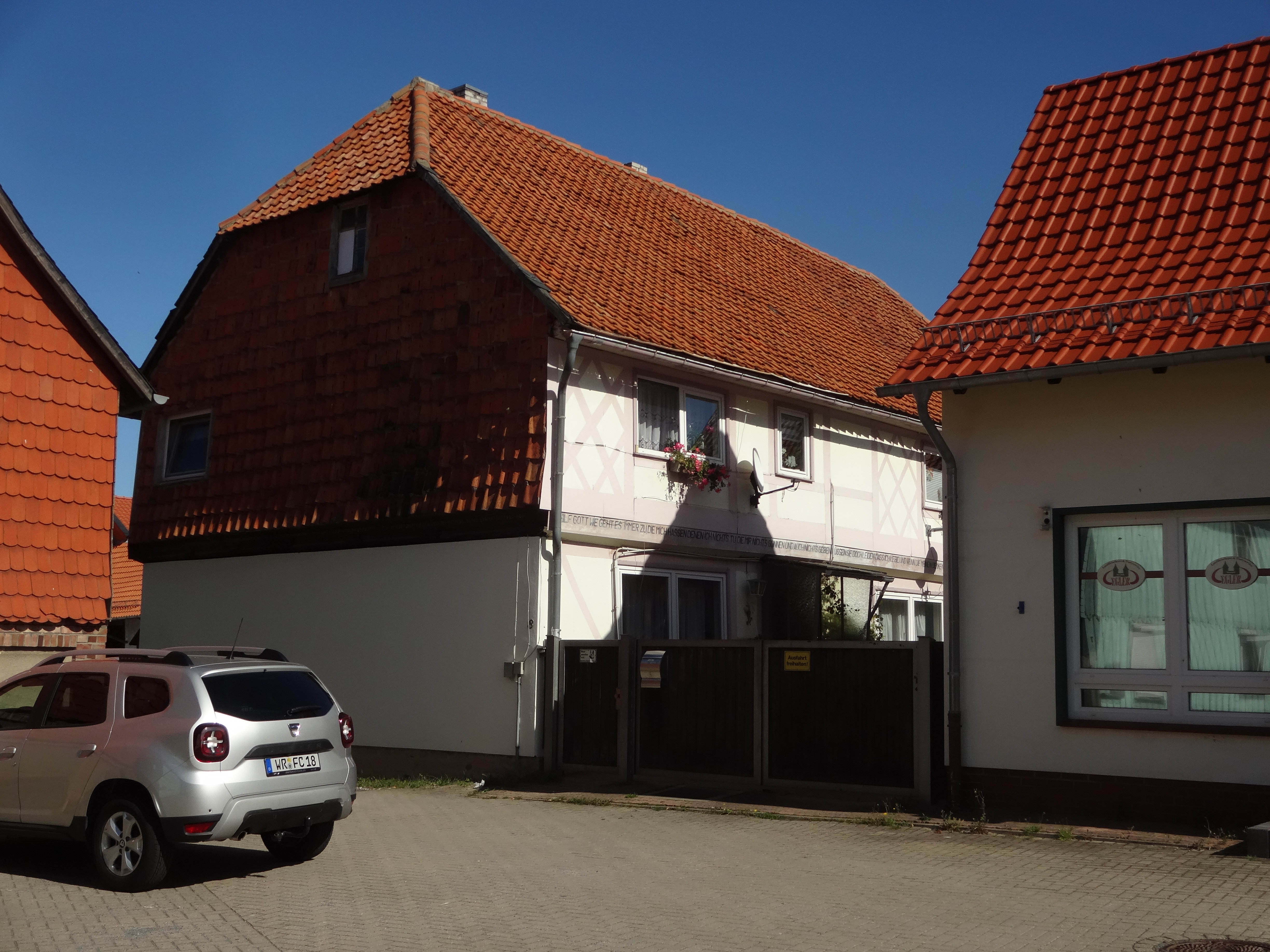 denkmalgeschütztes Bauernhaus in der Schulstraße 8 in Drübeck